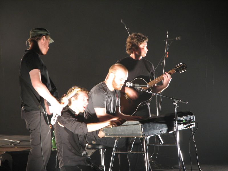 Coldplay in Hong Kong, 2006.